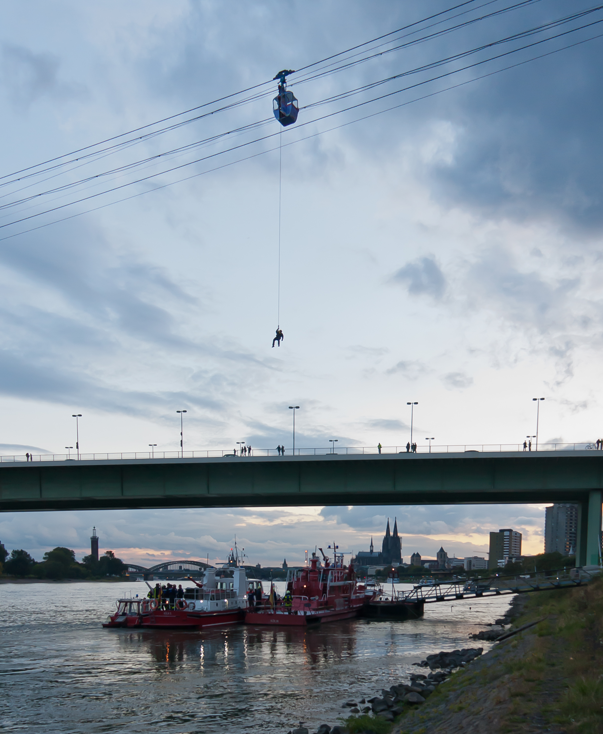 Höhenrettungsübung der Feuerwehr Köln an der Seilbahn über den Rhein.